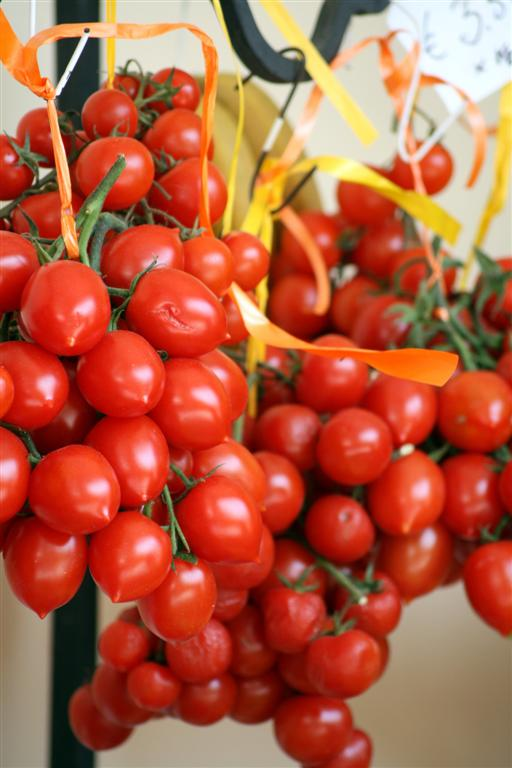 Pomodorini vesuviani - Napoli - Italia.